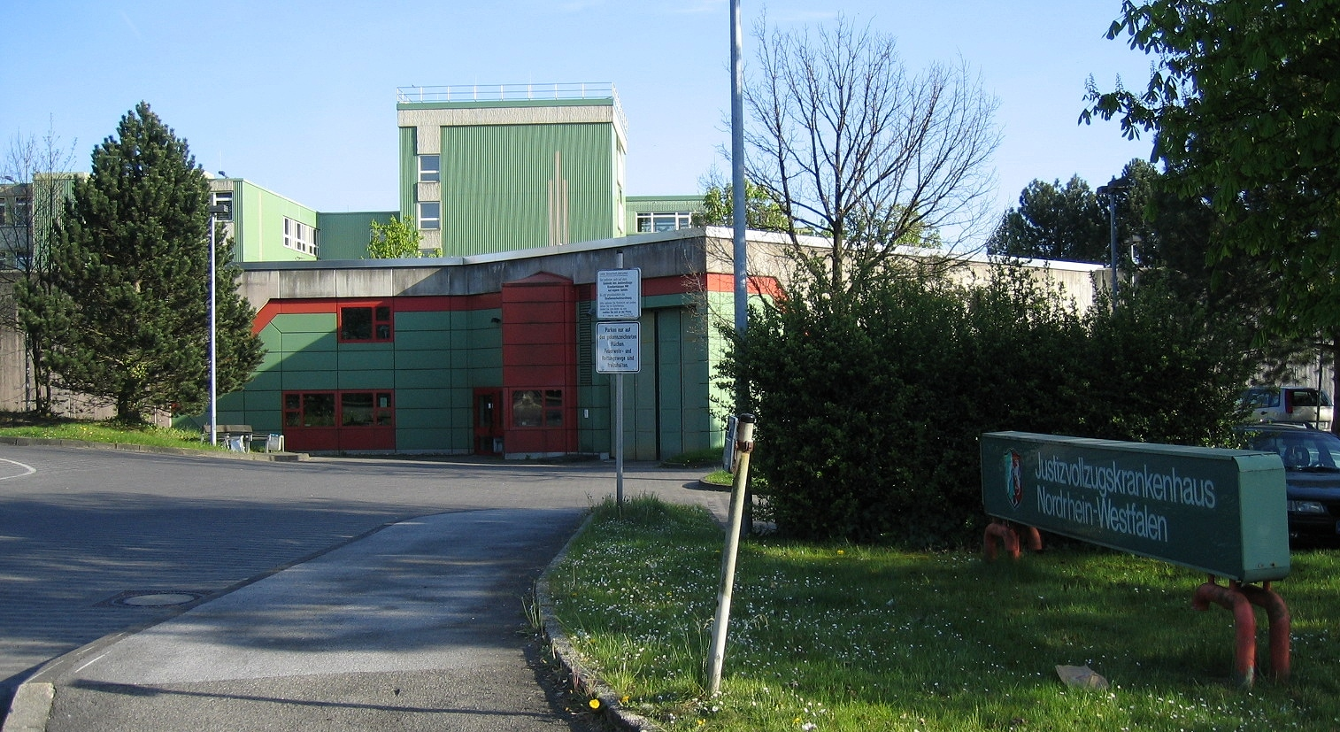 Justizvollzugskrankenhaus Nordrhein-Westfalen in Fröndenberg.